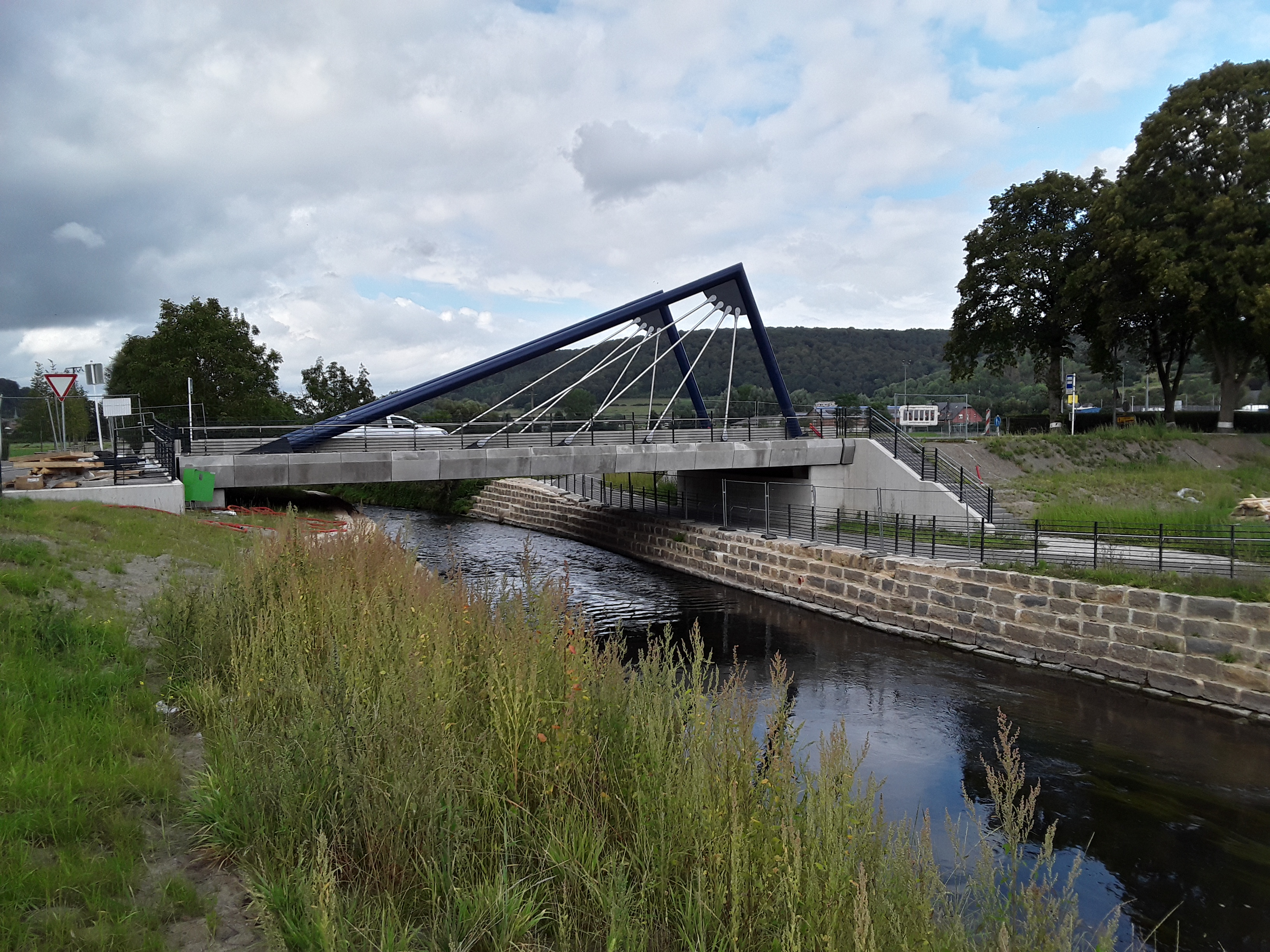 Gosseldange: le nouveau pont (2016) sur l'Alzette; regardé en aval.